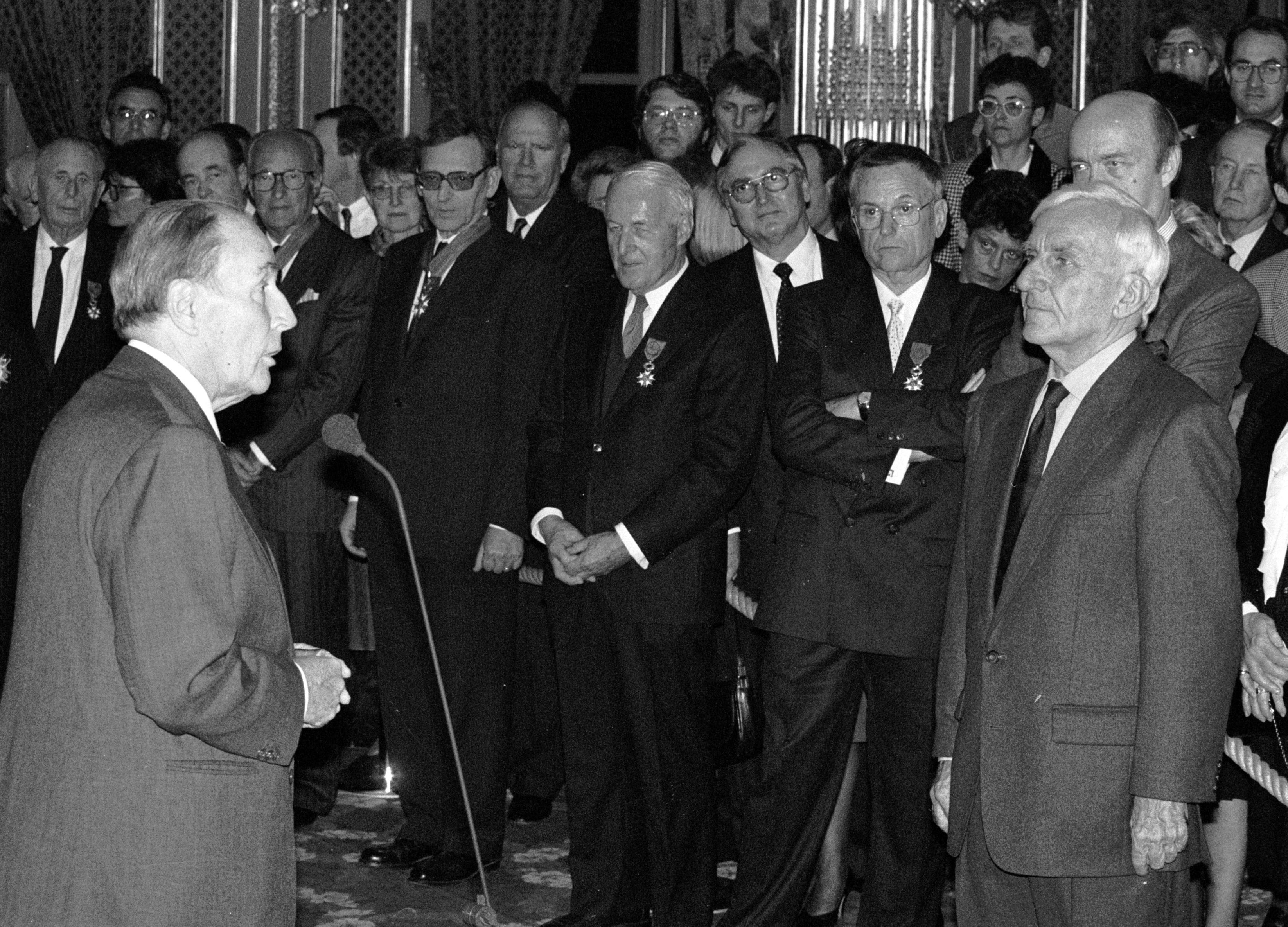 François Mitterrand, président de la République française, remet à Légion d'honneur au journaliste français Maurice Séveno le 28 novembre 1991 au Palais de l'Élysée à Paris.